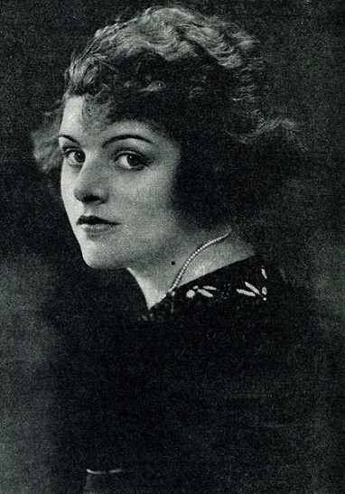 Elaine Hammerstein